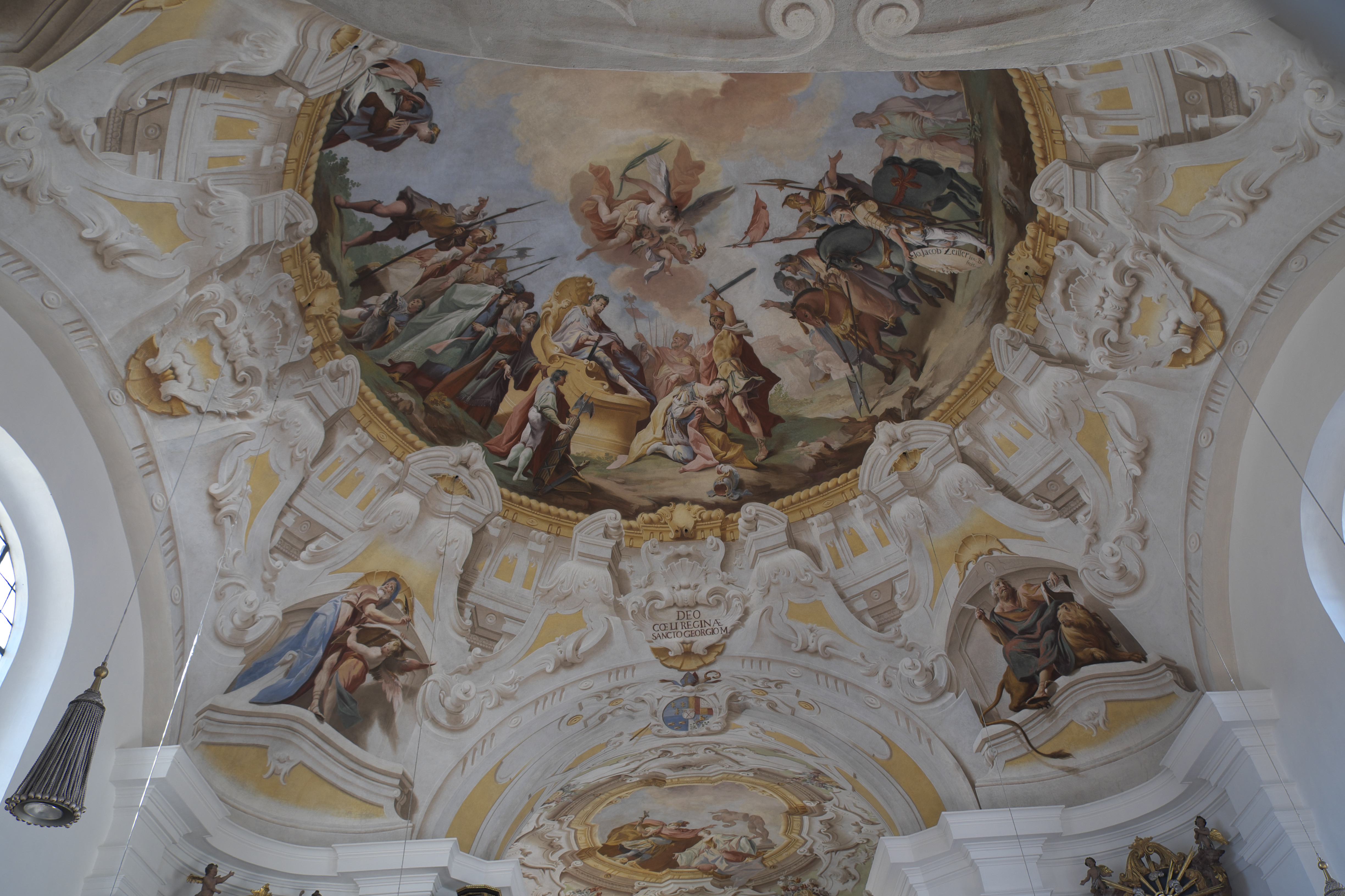 Katholische Kuratiekirche St. Georg in Bichl im Landkreis Bad Tölz-Wolfratshausen (Bayern/Deutschland), Deckenfresko von Johann Jakob Zeiller, von 1753, bezeichnet: „Jo. Jacob Zeiller inv. et fecit 1753“; Darstellung: Martyrium des hl. Georg